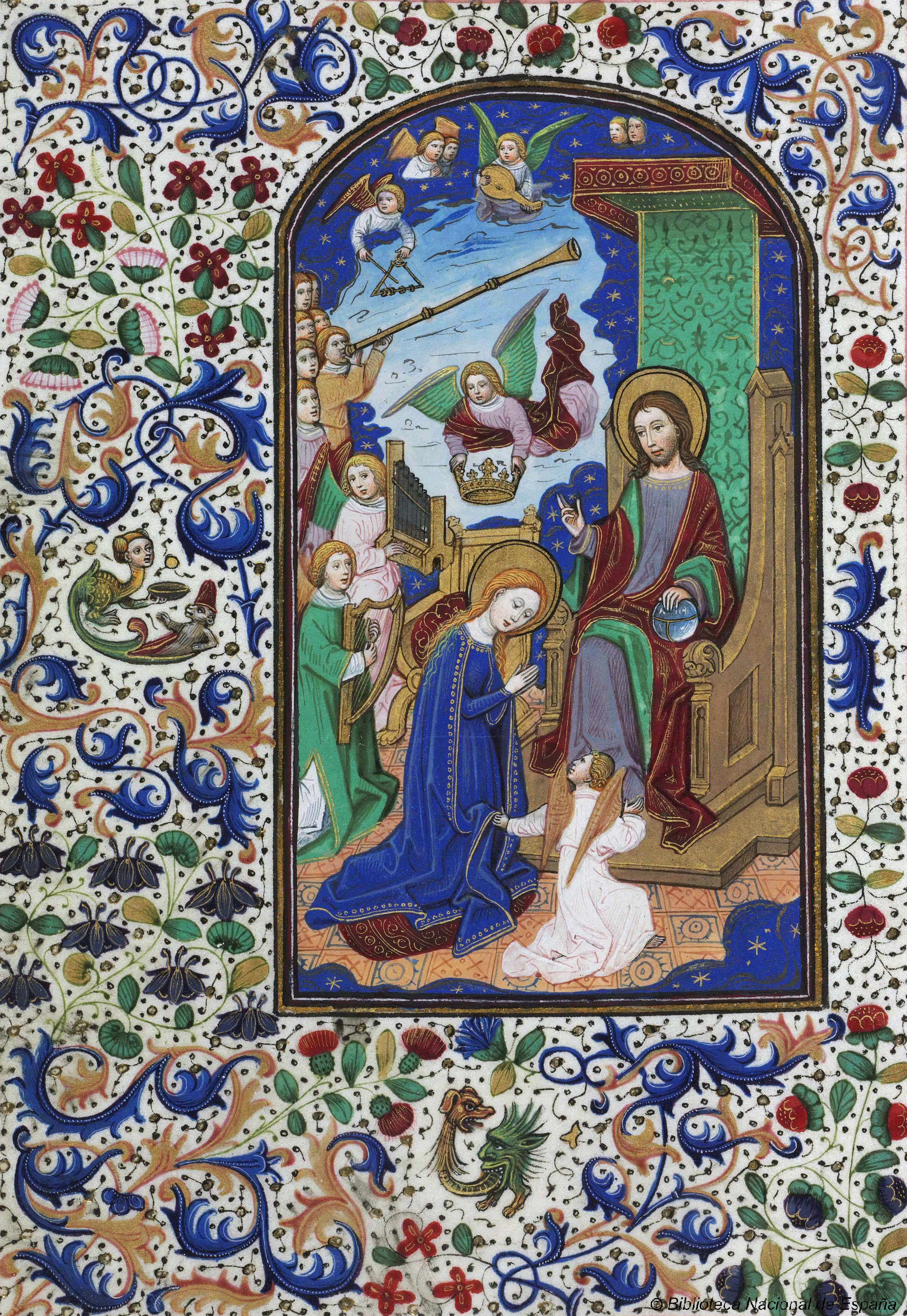 Le couronnement de la Vierge, p. 111v du Livre d'heures de Léonor de la Vage, c 1468, bibliothèque nationale d'Espagne (inv. Vitr/24/2)